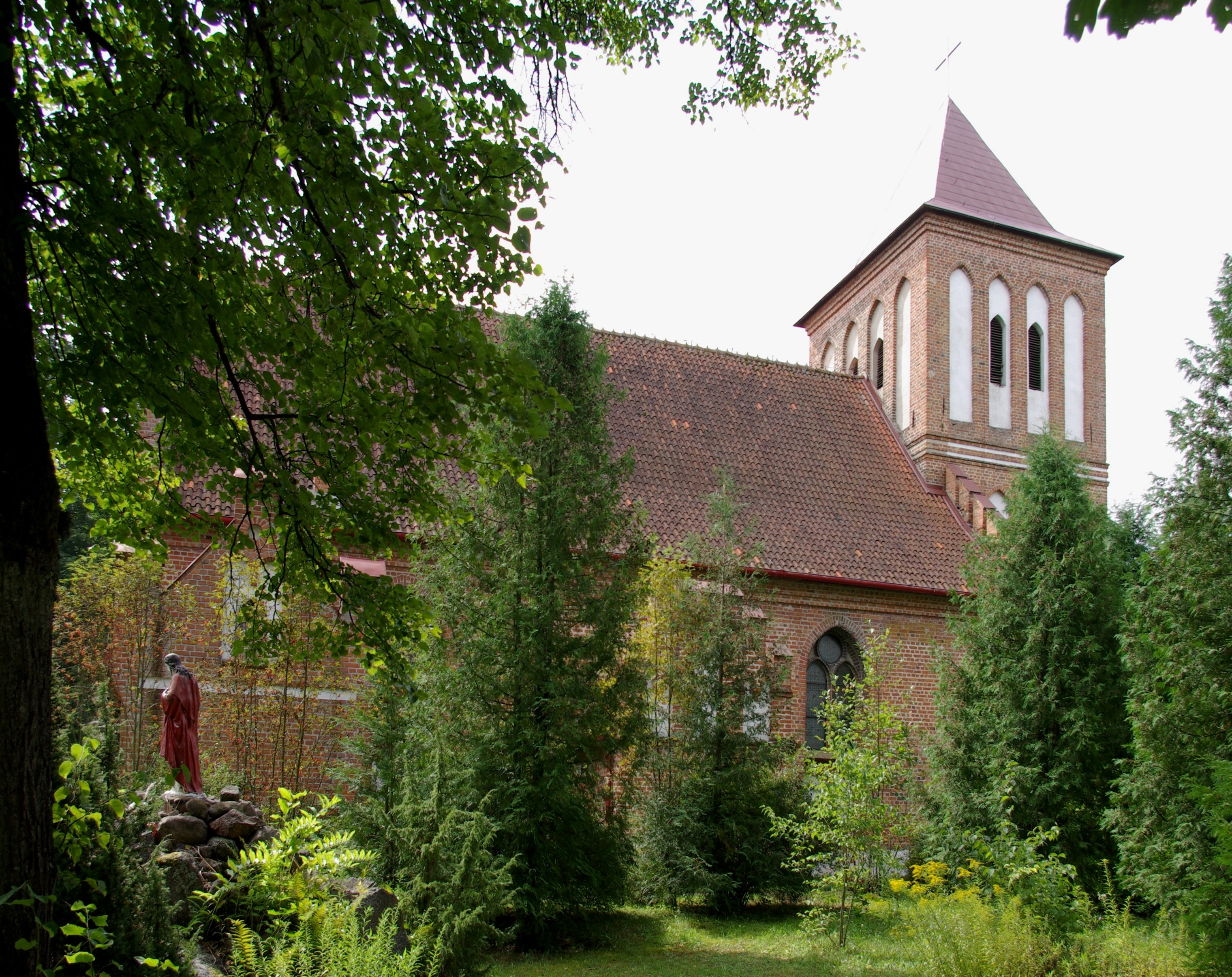 Kuty - dawny kościół ewangelicki, obecnie rzymskokatolicki kościół parafialny p.w. św. Maksymiliana Marii Kolbego, 1586, 1973-1974